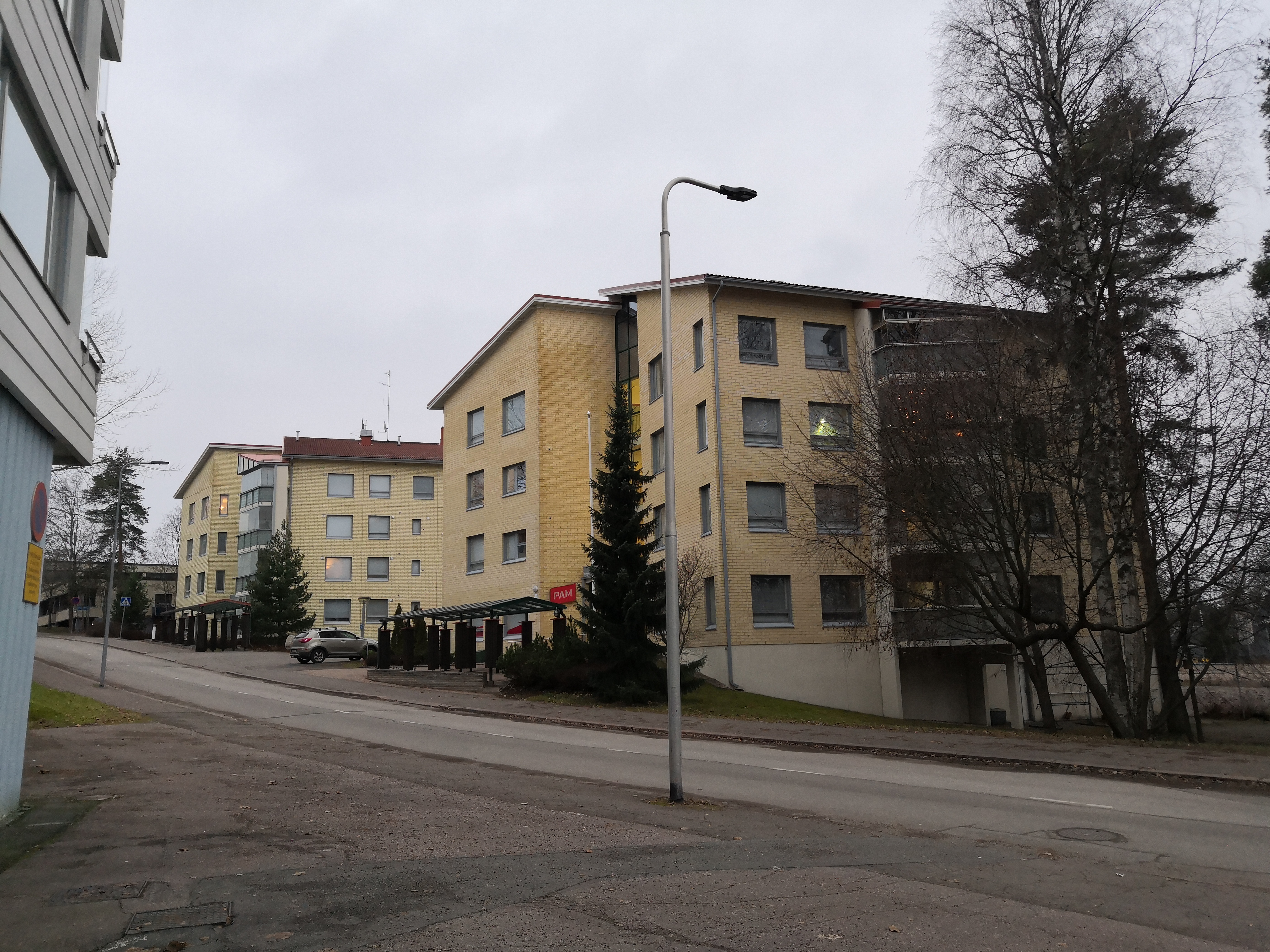 Kerrostaloja Kouvolan Urheilijankujalla